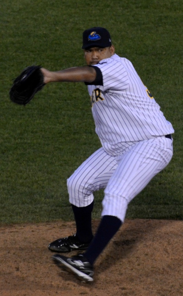 Carlos Silva